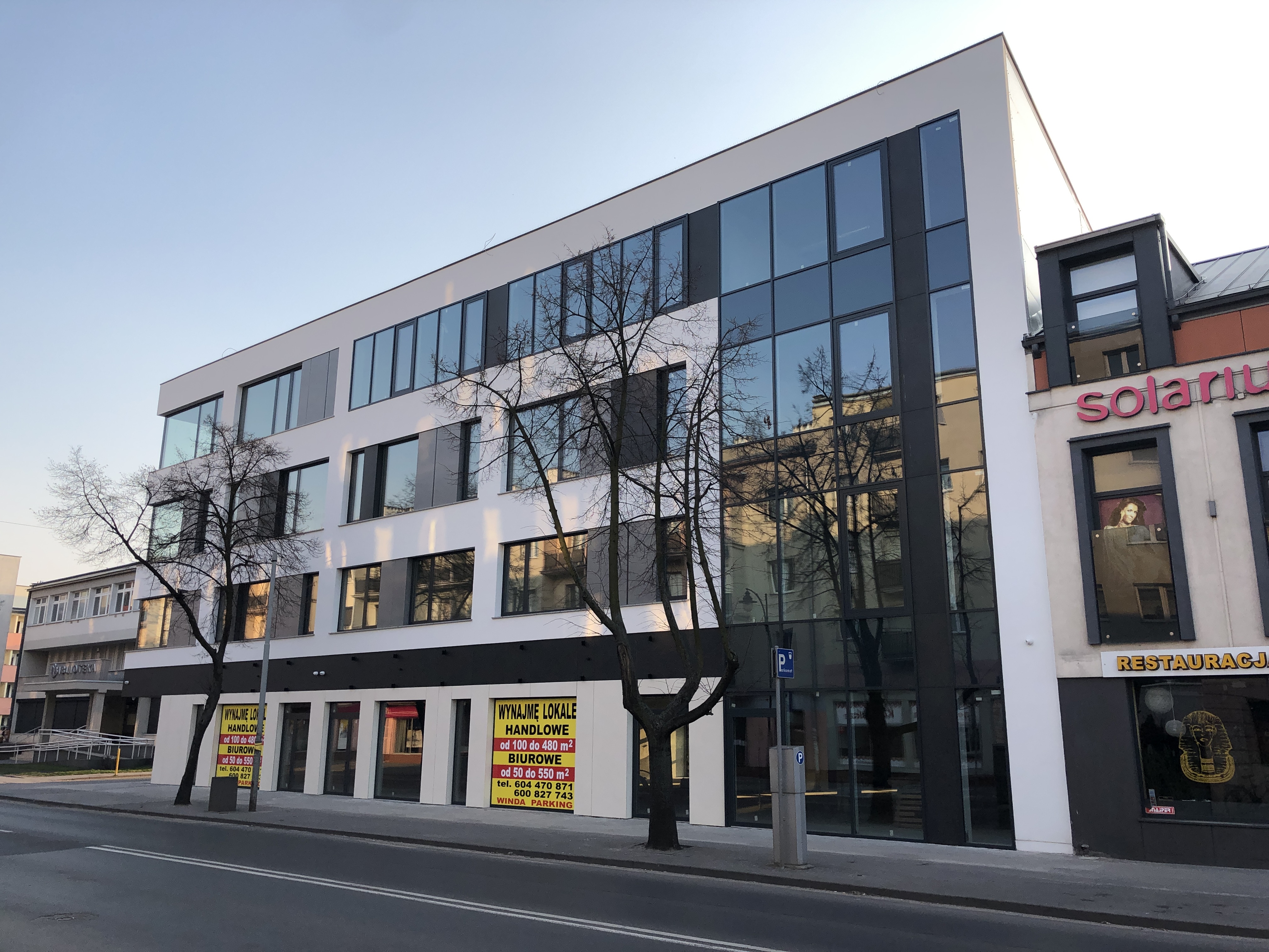 Ul. Warszawska 15 (2020 r.)